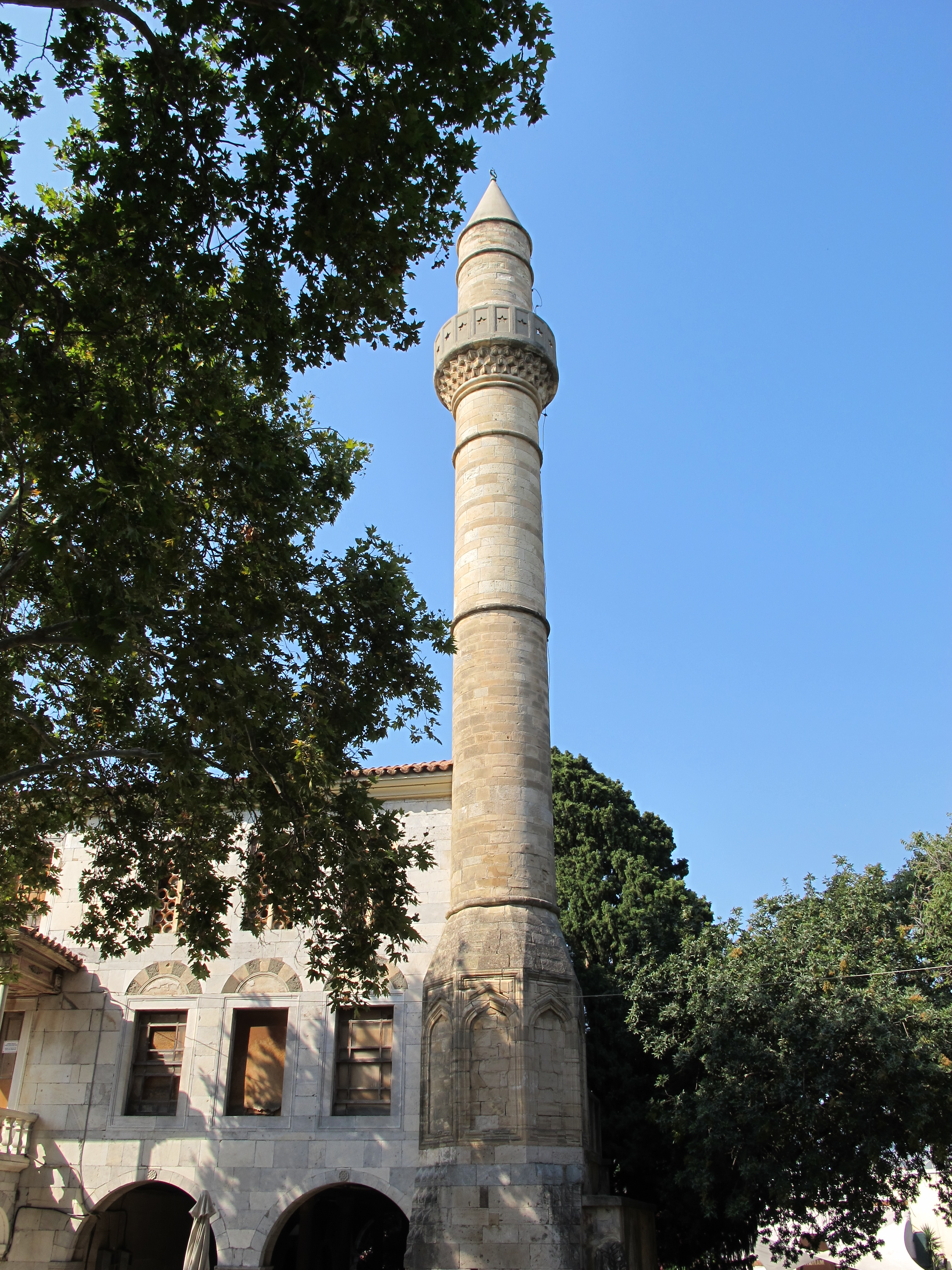 Kos città, palazzo con minareto